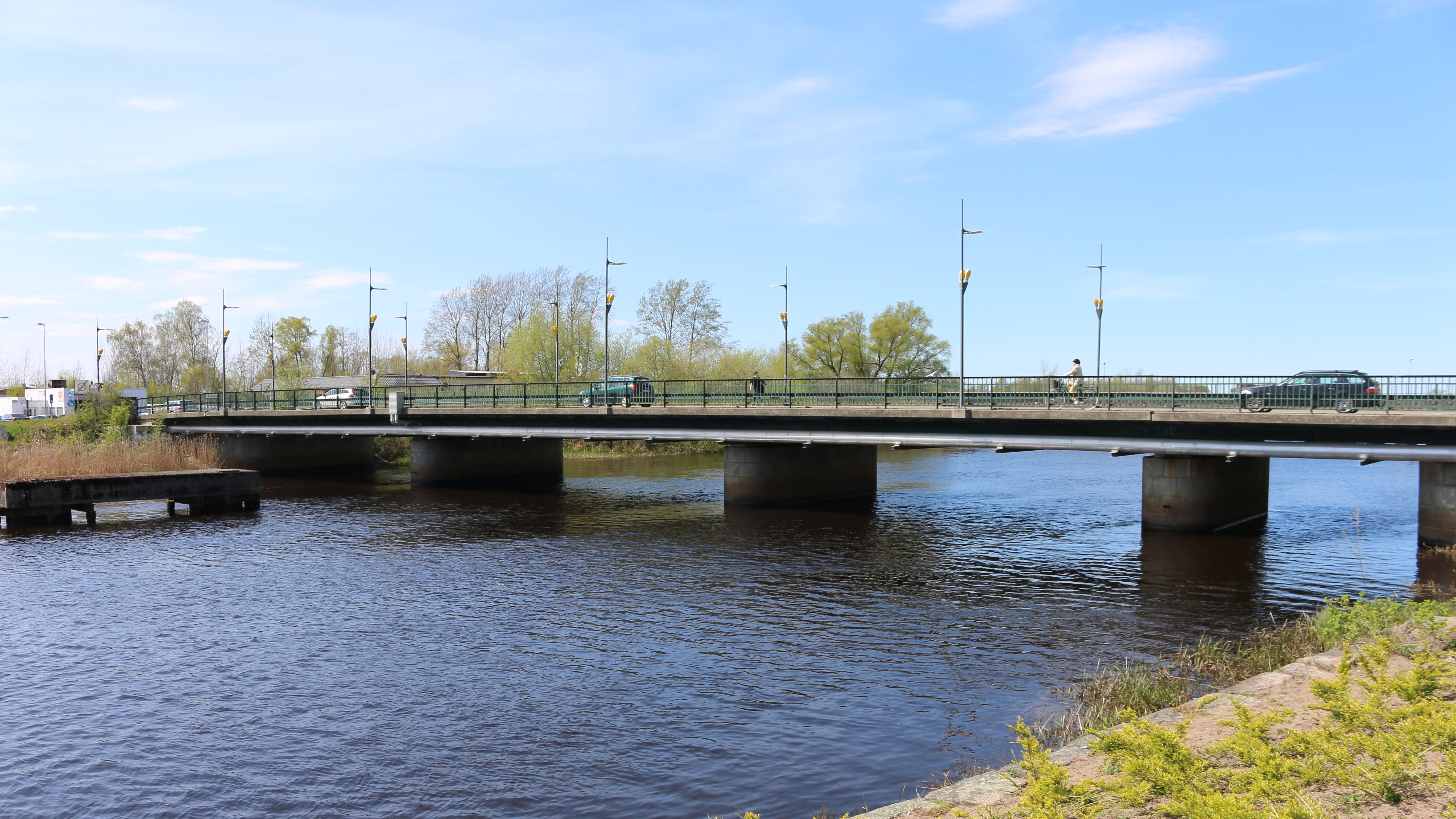 Långe bro, Kristianstad